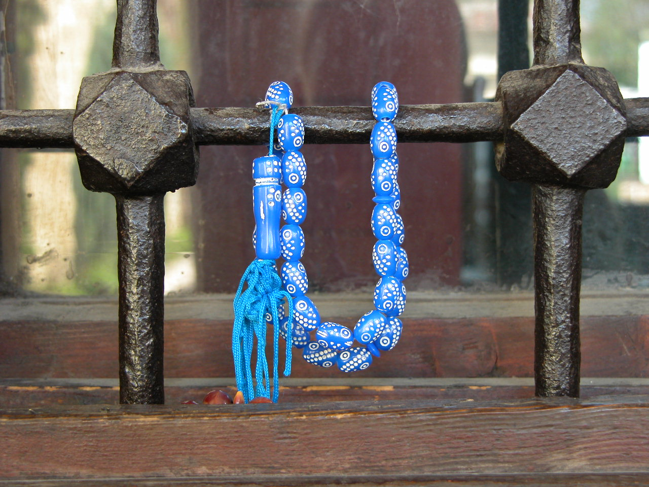 Šarena Džamija, Tetovo